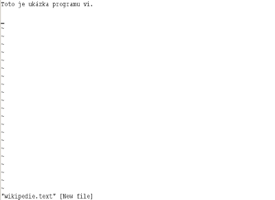 Prostředí unixového editoru vi